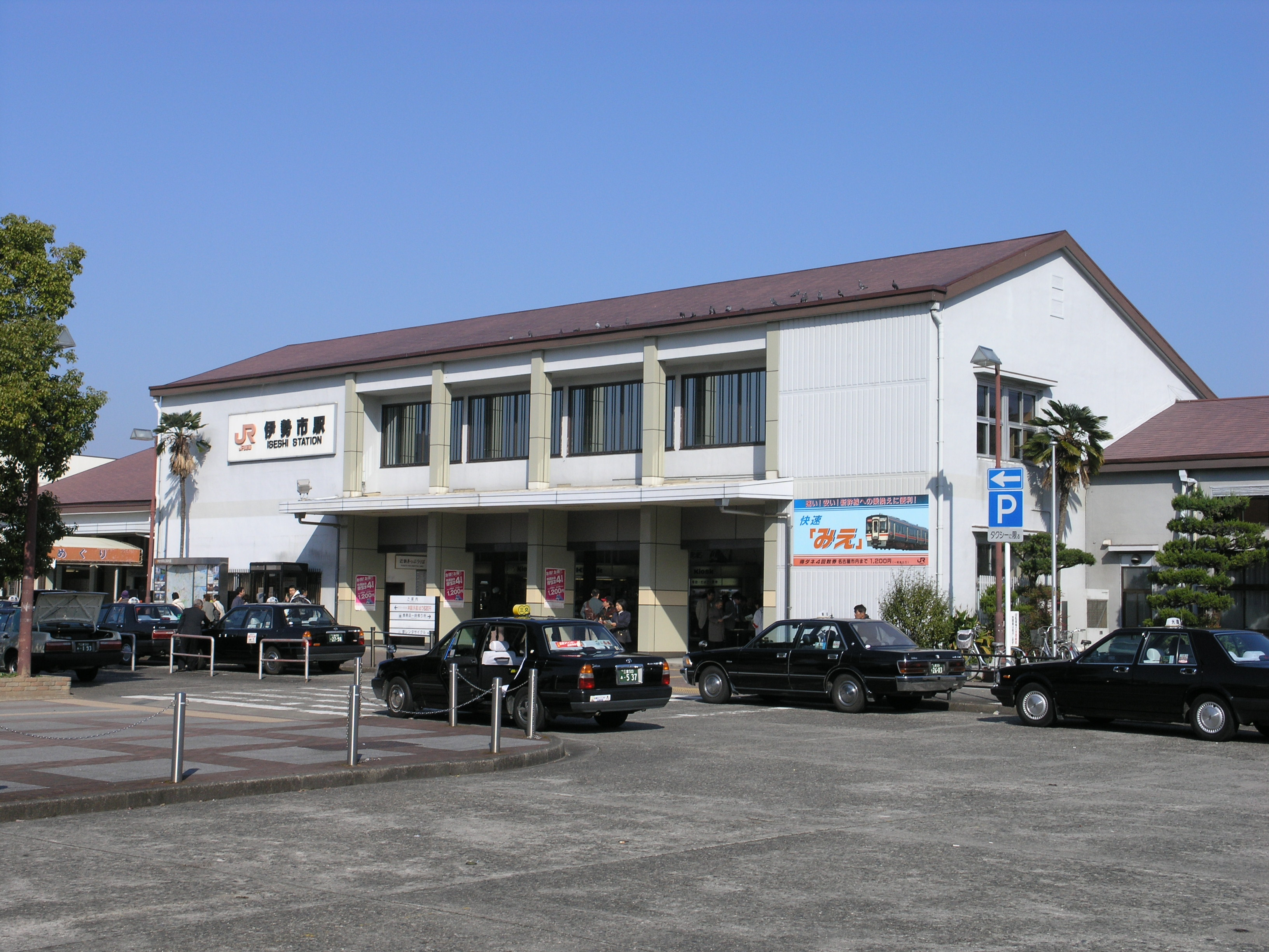 JR伊勢市駅舎 2007年11月25日撮影。 機材：C-8080WZ 撮影者：Kansai explorer